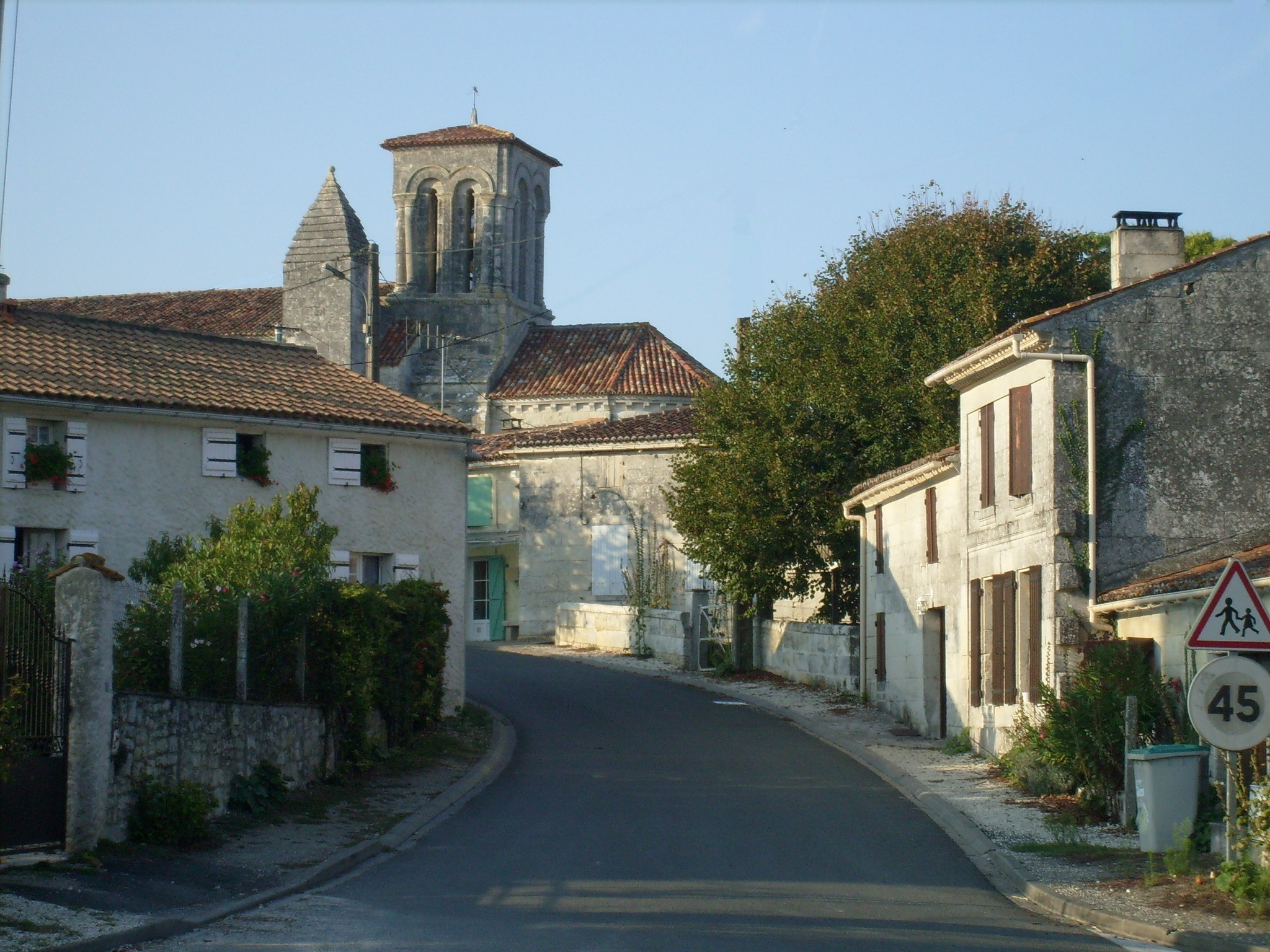 Centre-bourg d'Ecurat